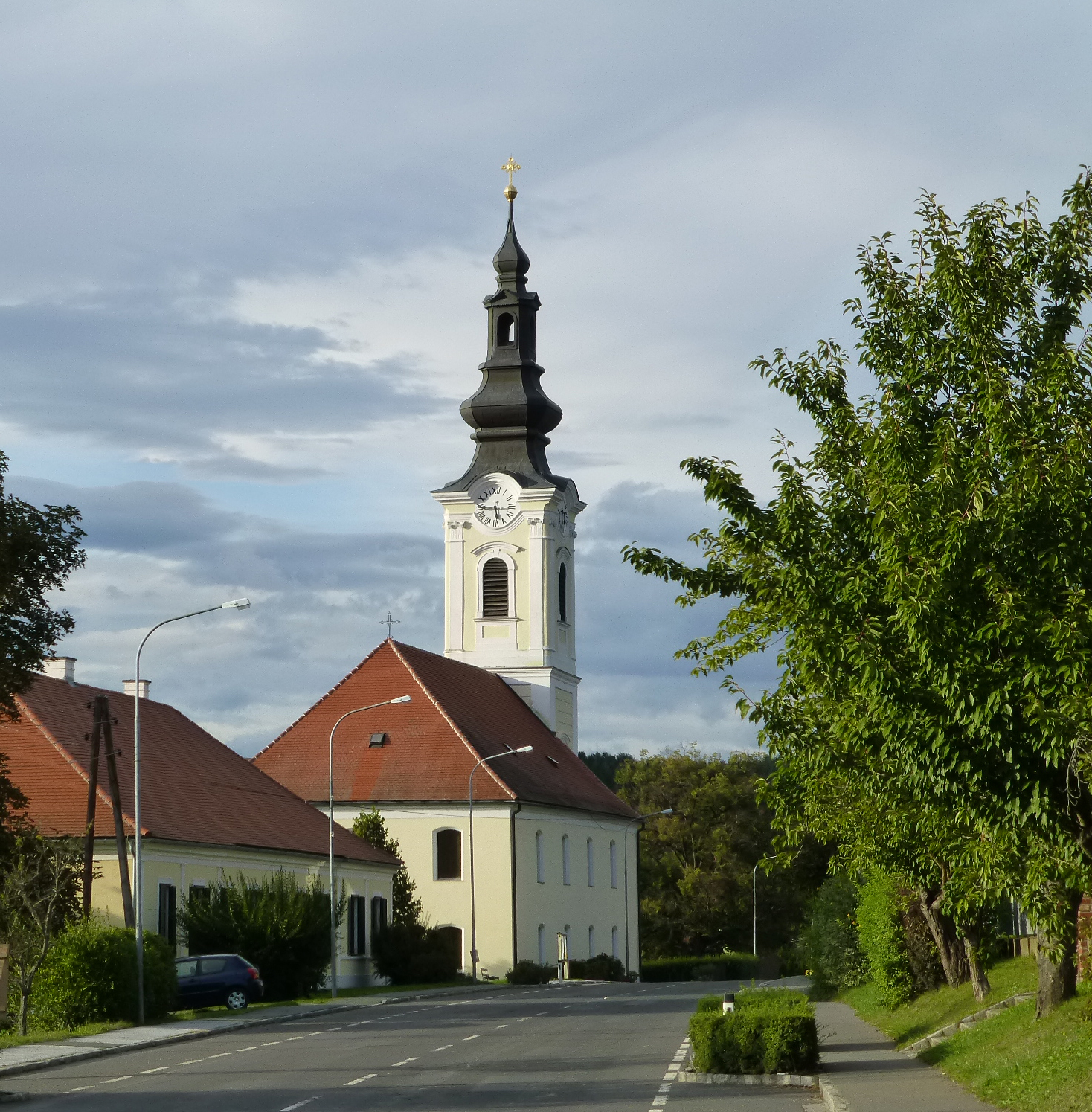 Eglise évangélique de Kukmirn, Burgenland, district de Güssing, Autriche.